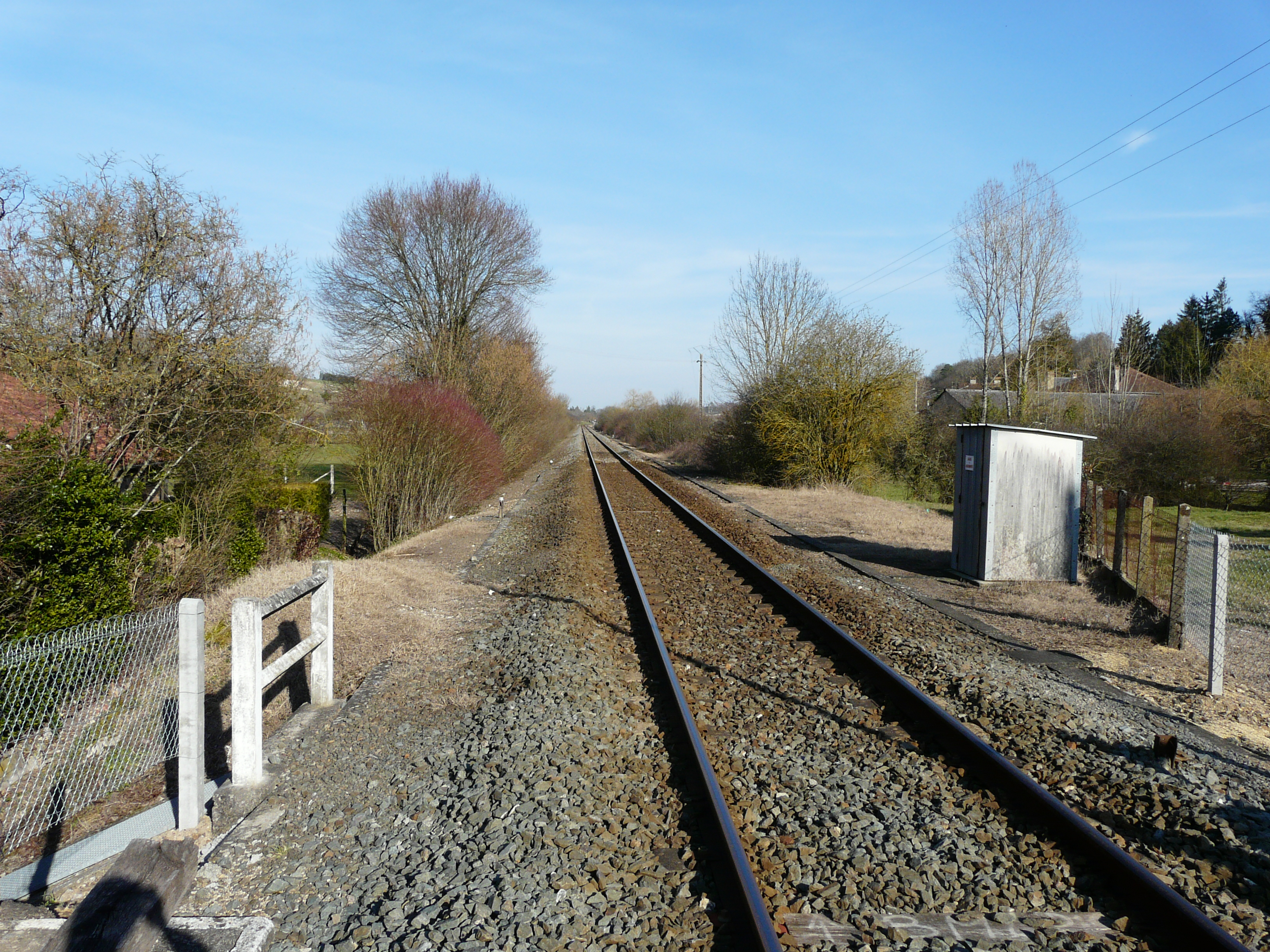 La voie ferrée (ligne Coutras - Tulle) au passage à niveau du bourg de Saint-Pierre-de-Chignac, Dordogne, France.